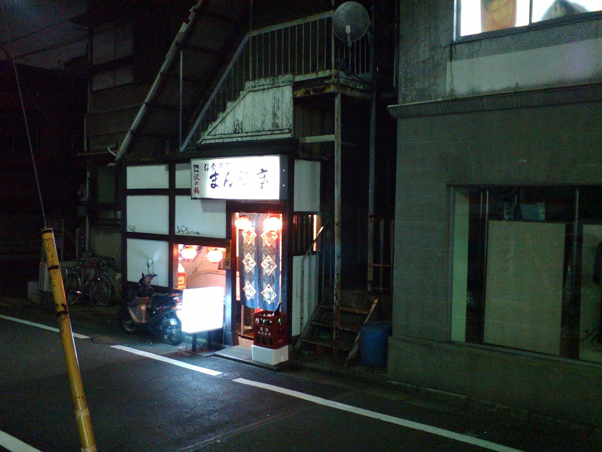 東電OL殺人事件の事件現場となったアパート周辺